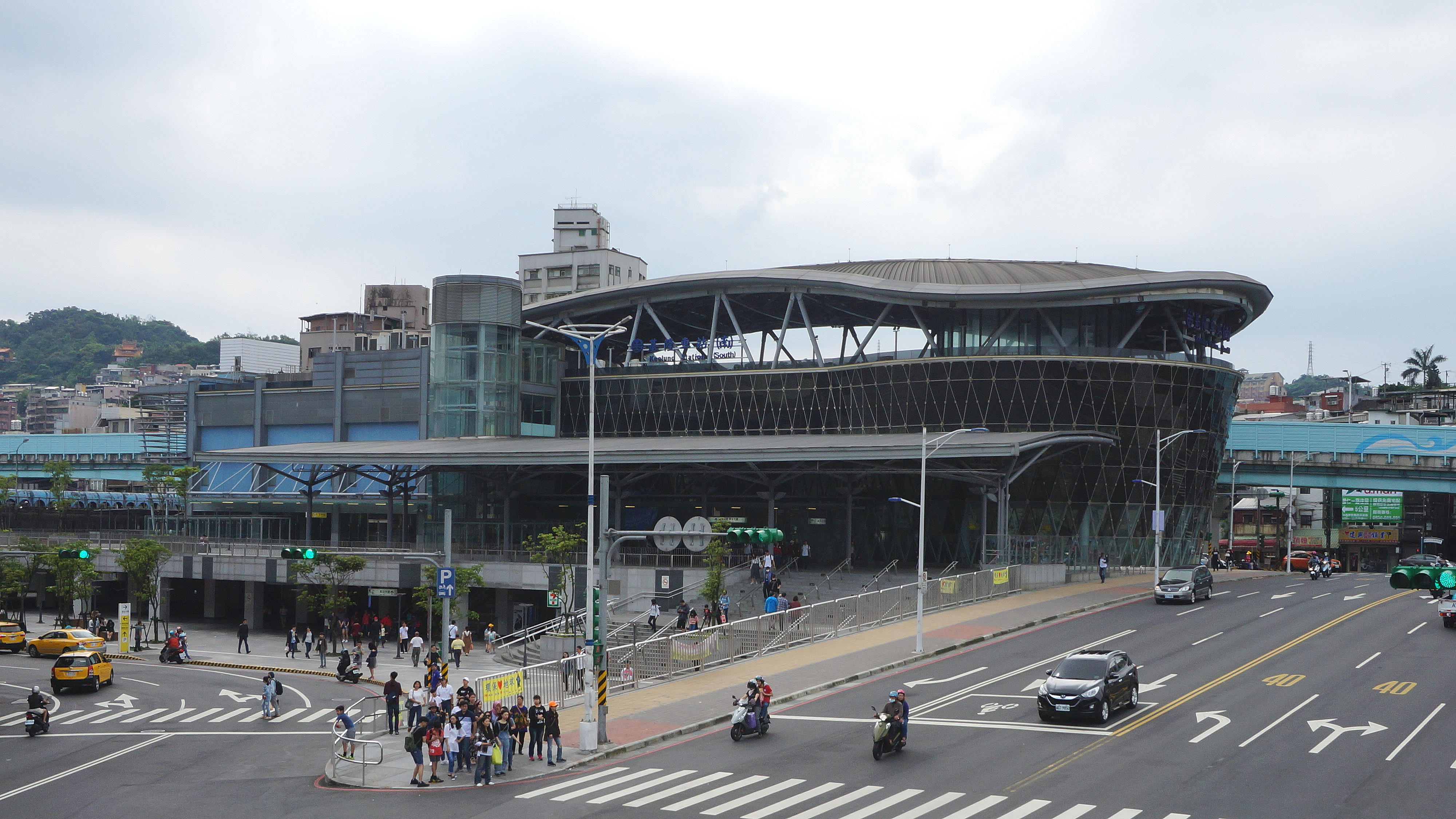 從基一信橋俯瞰臺灣鐵路管理局基隆車站南站。